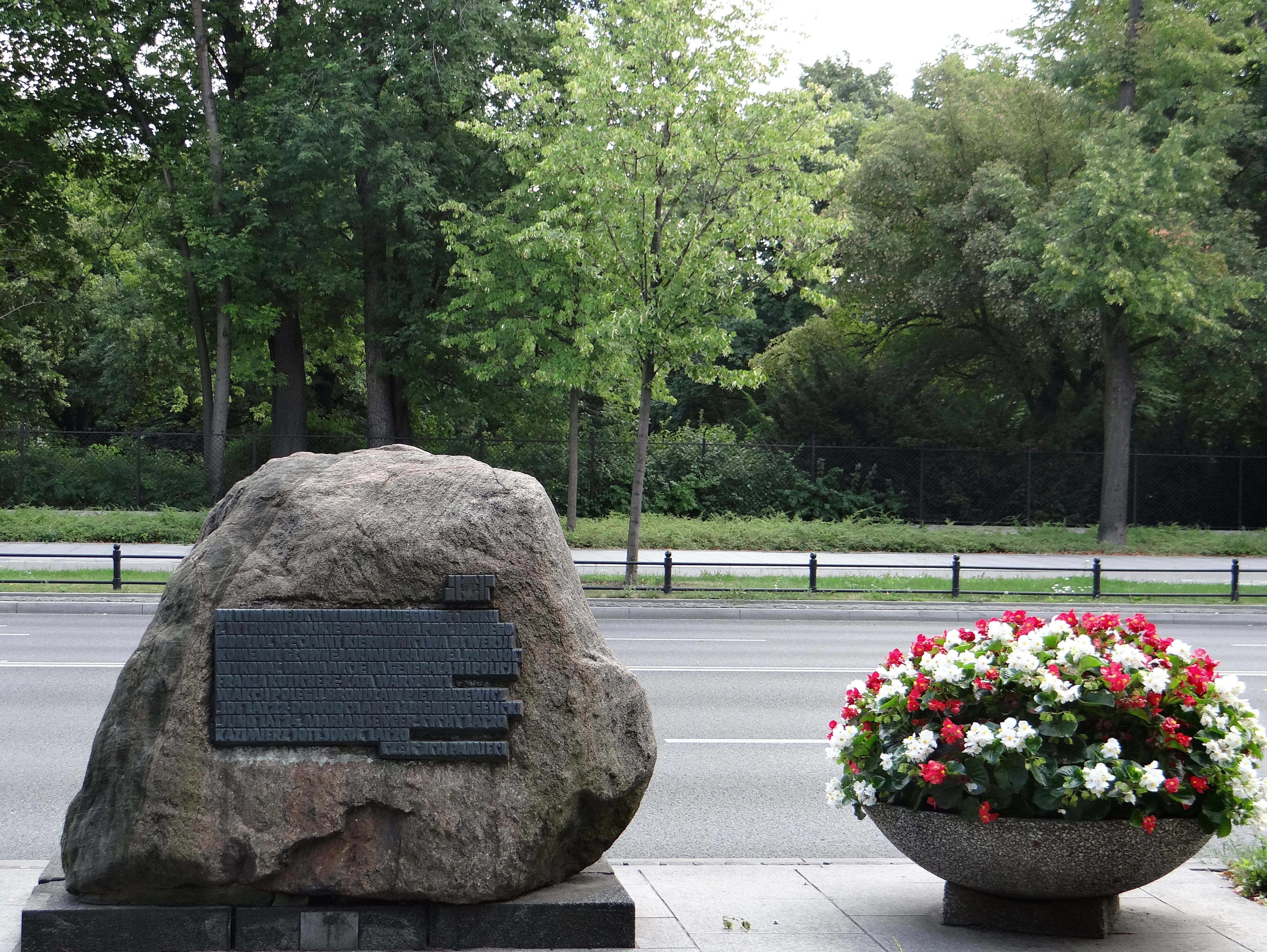 Pomnikowy głaz z tablicą pamiątkową wskazuje miejsce dokonania udanego zamachu na kata Warszawy, gen. SS i policji Franza Kutscherę